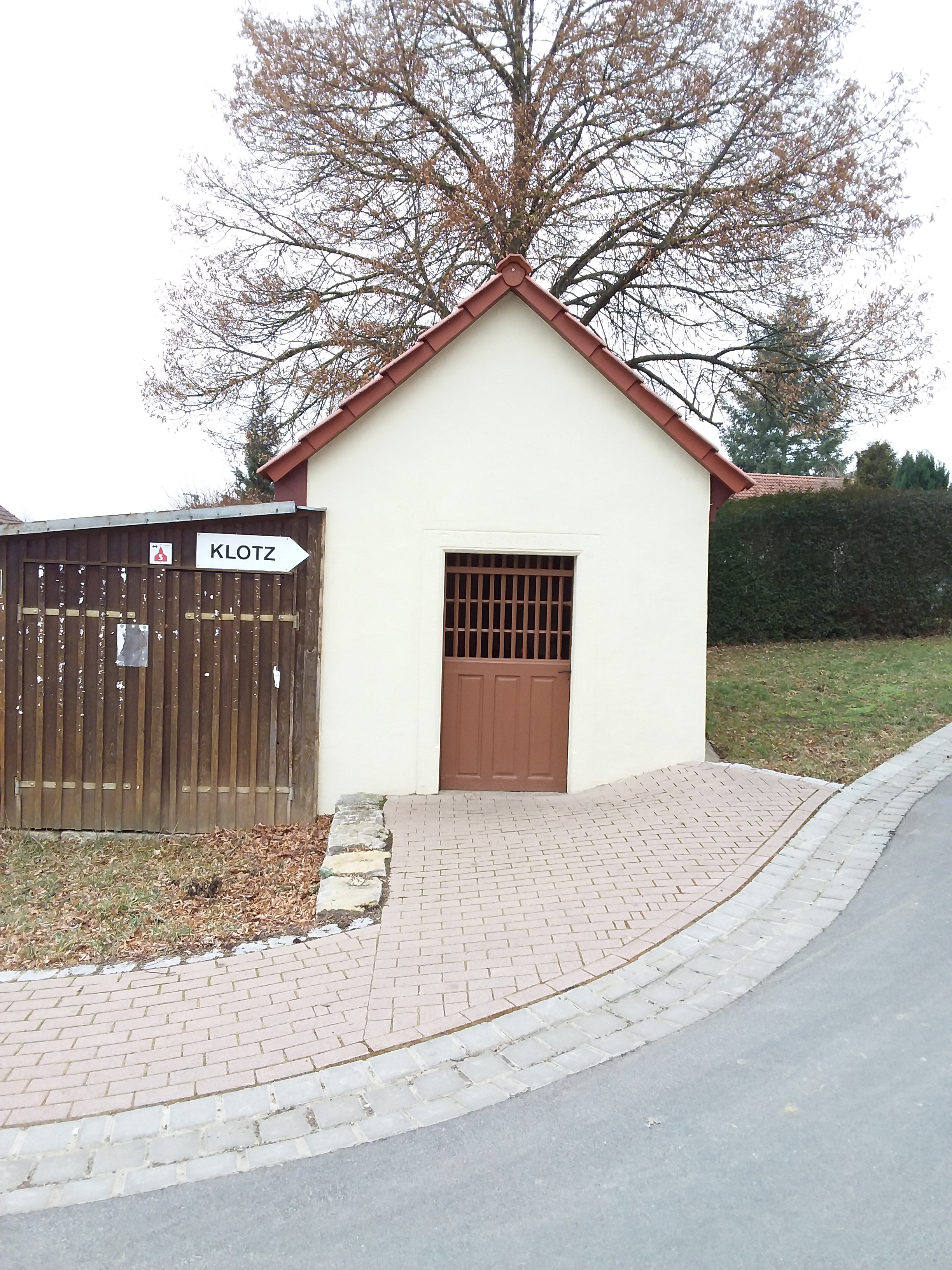 Schulstraße 6 (Vilchband 2017)